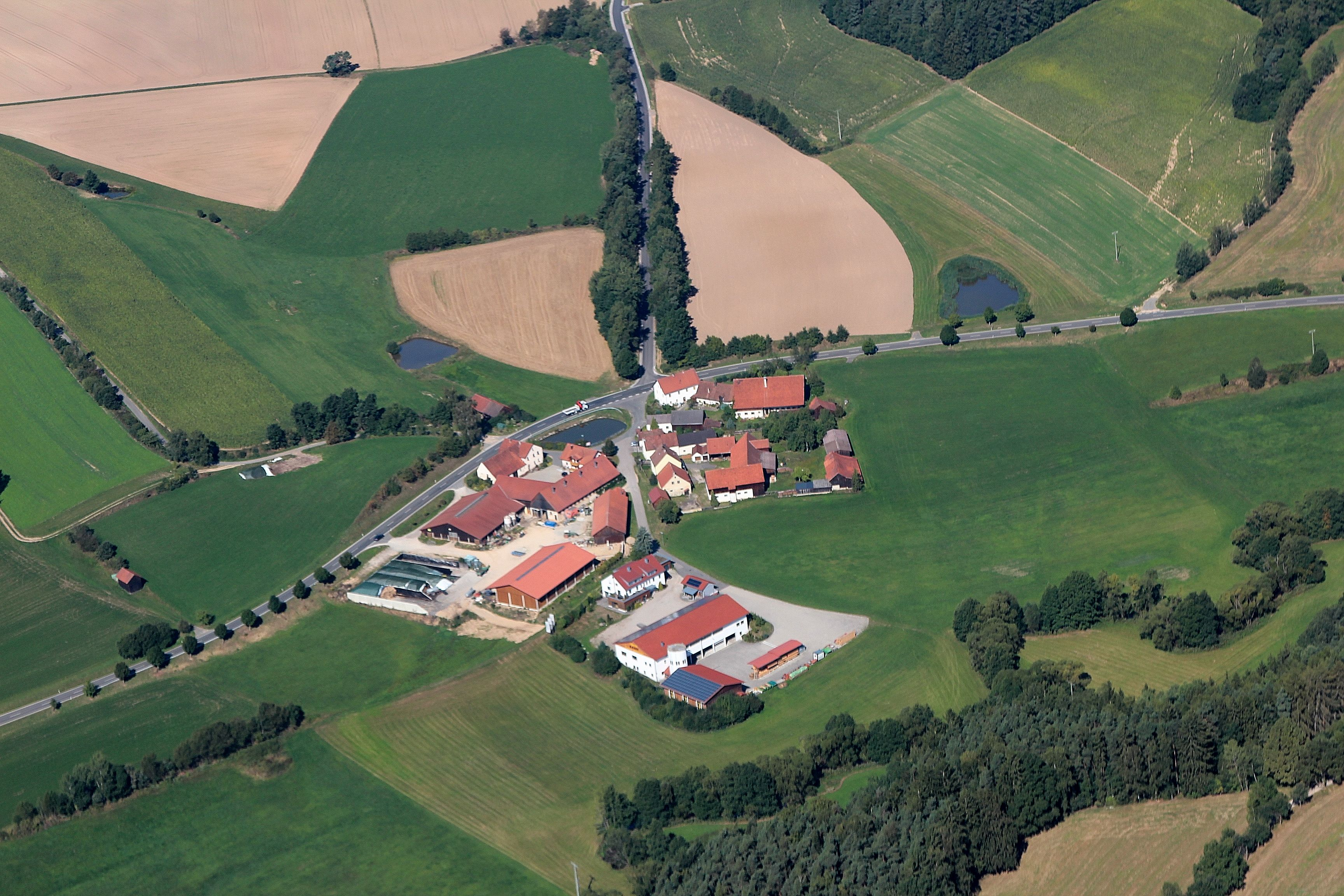 Oberaschau; Neunburg vorm Wald, Landkreis Schwandorf, Oberpfalz, Bayern